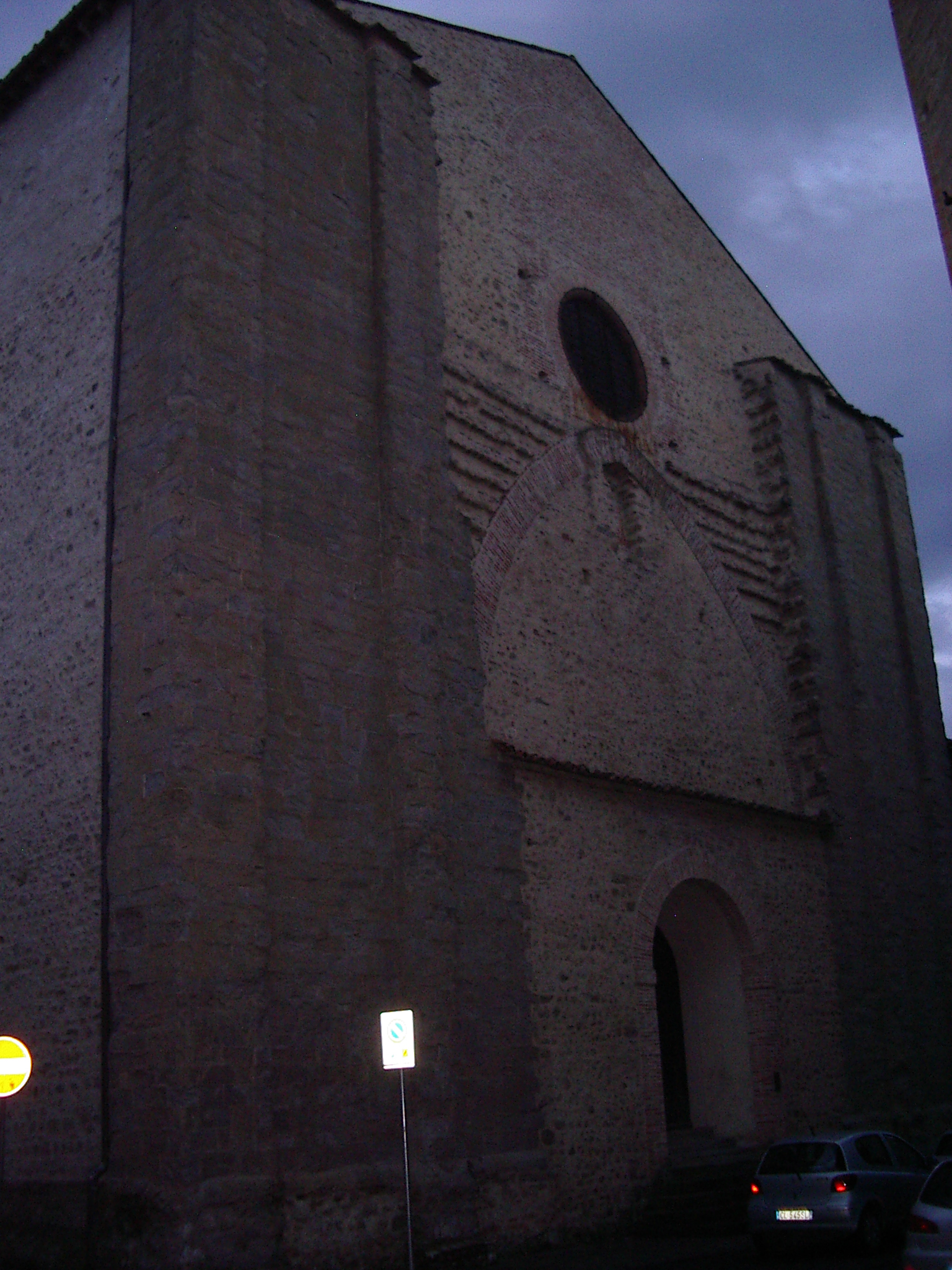 église San Domenico -Città di Castello-Ombrie-Italie